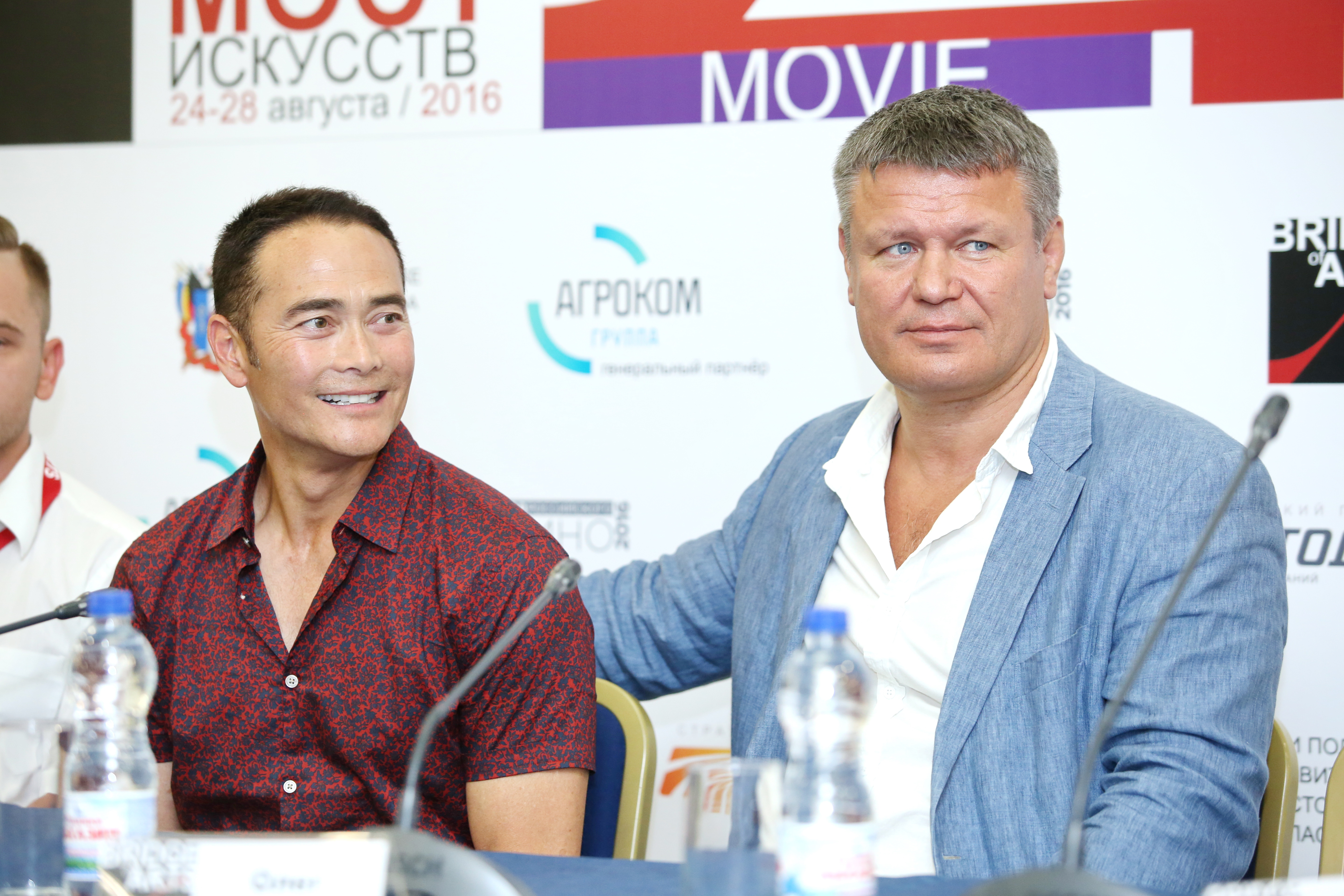 Марк Дакаскос и Президент фестиваля Олег Тактаров в рамках мероприятий Bridge of Arts 2016